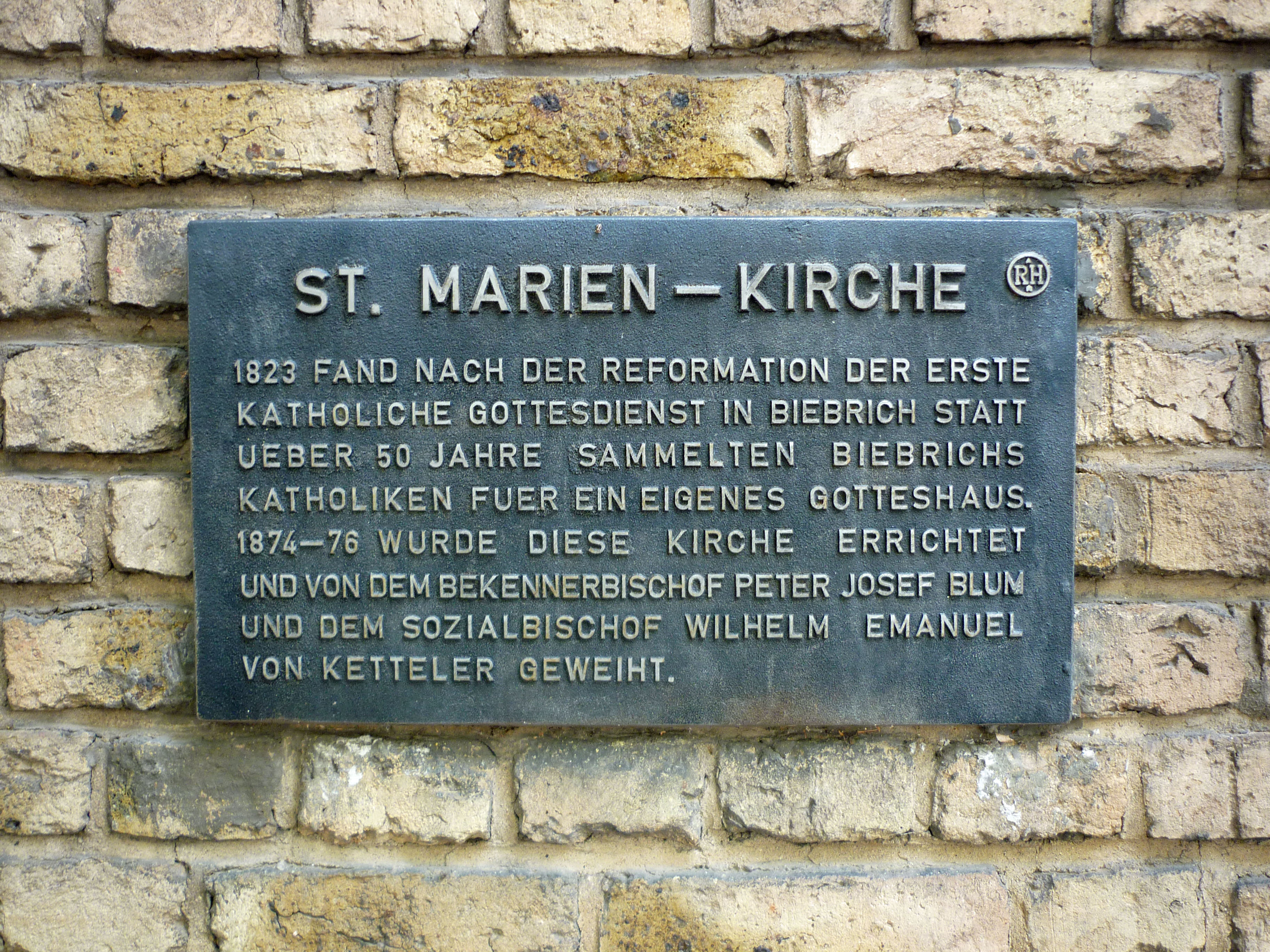 Informationstafel an der St. Marien-Kirche in Wiesbaden-Biebrich.